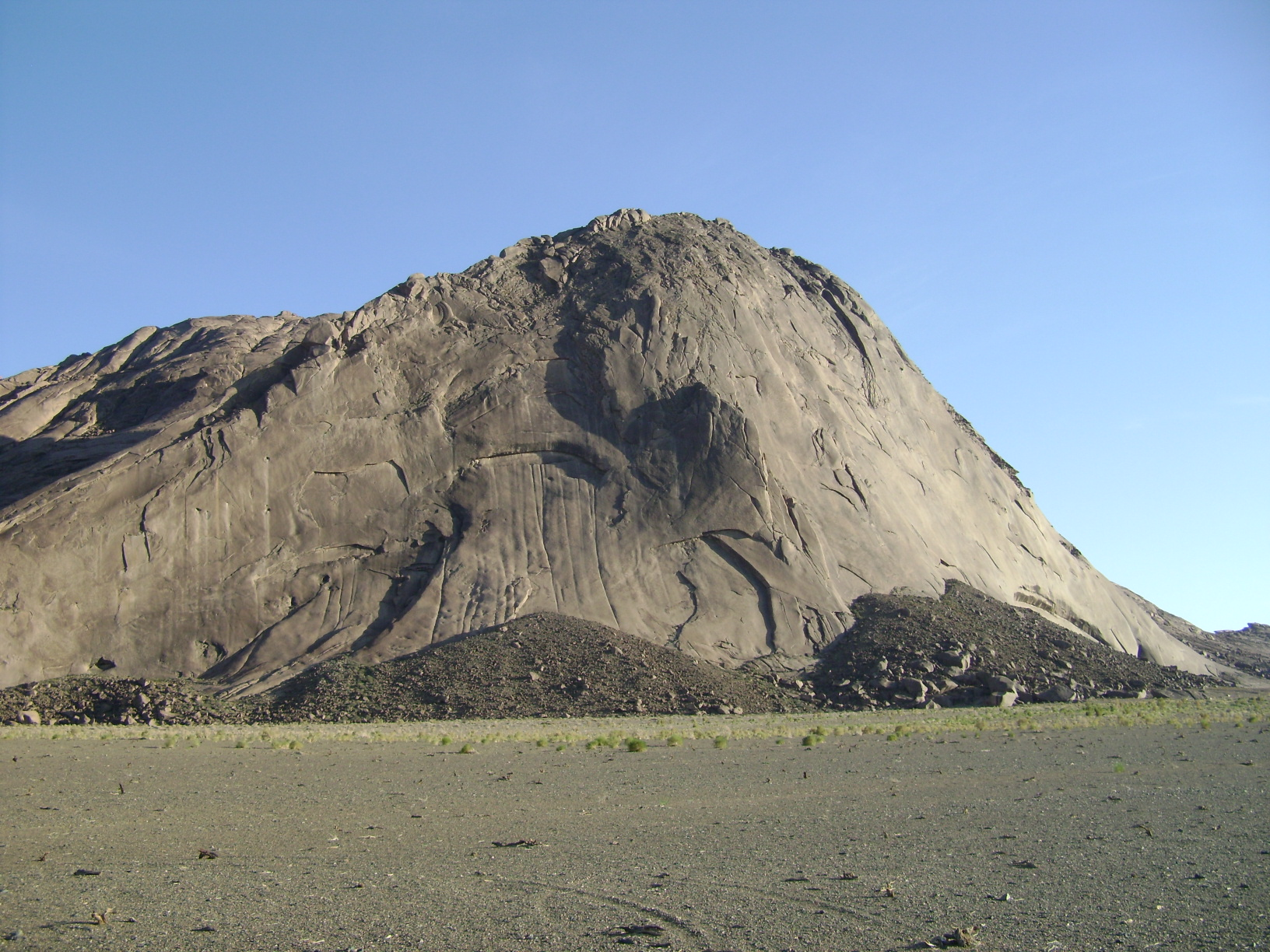 Eej Khairkhan Mount